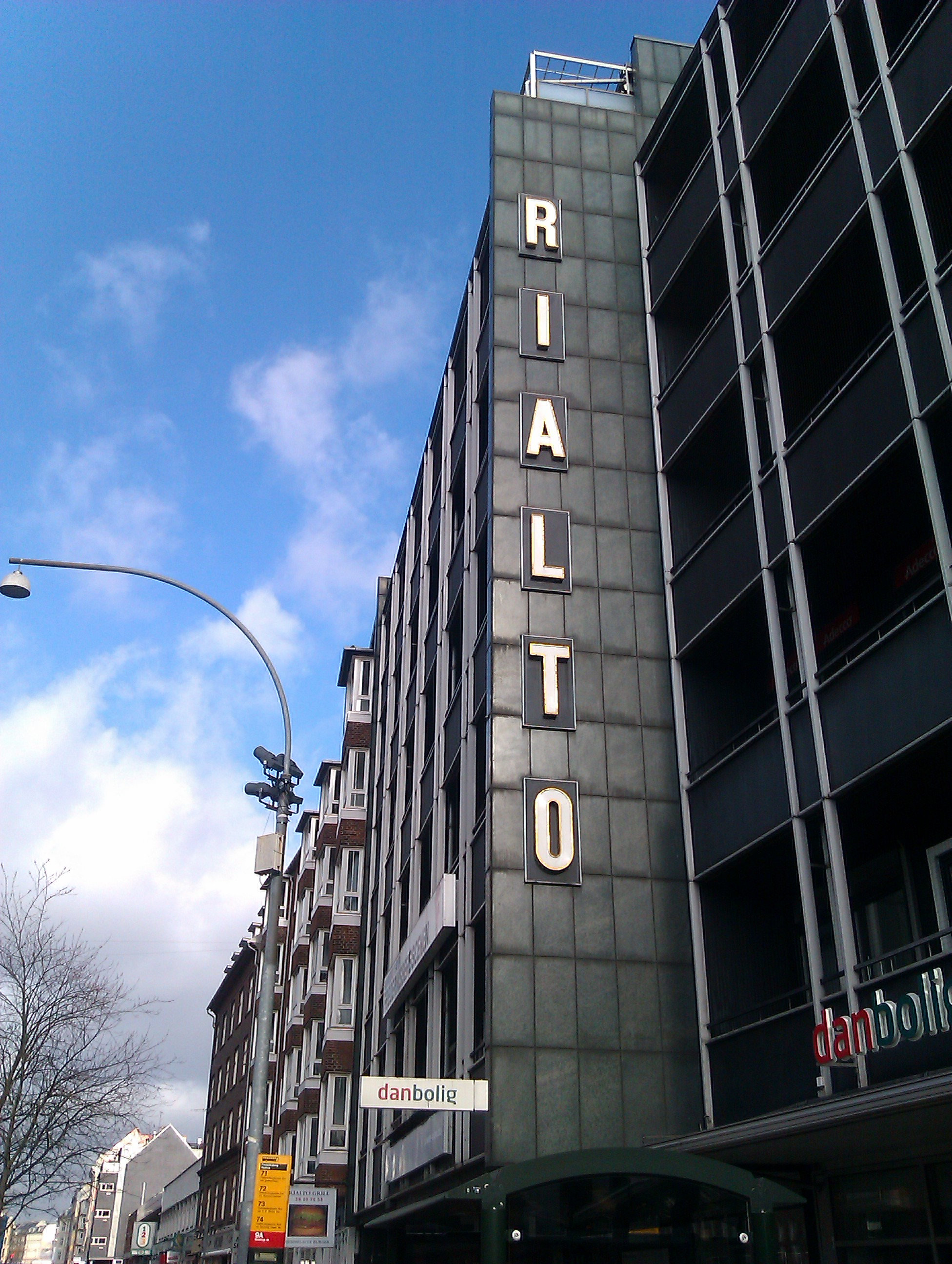 Rialto Teatret, Frederiksberg